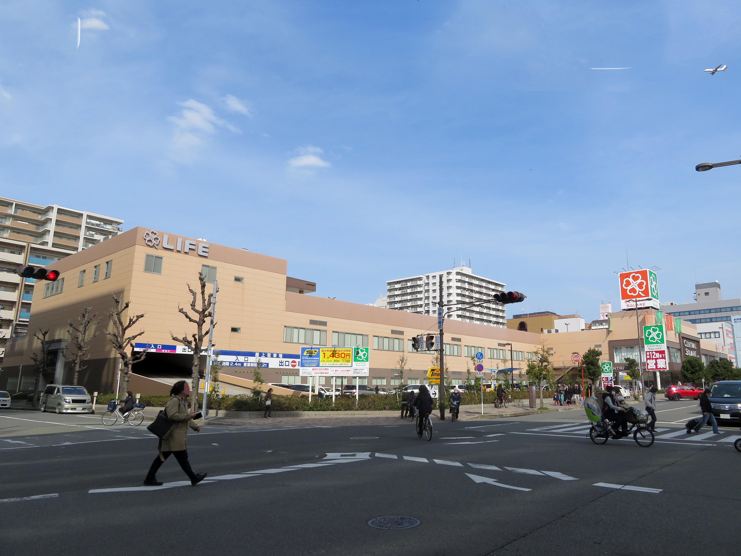 新大阪センイシティー（ゆめっせ）を撮影。